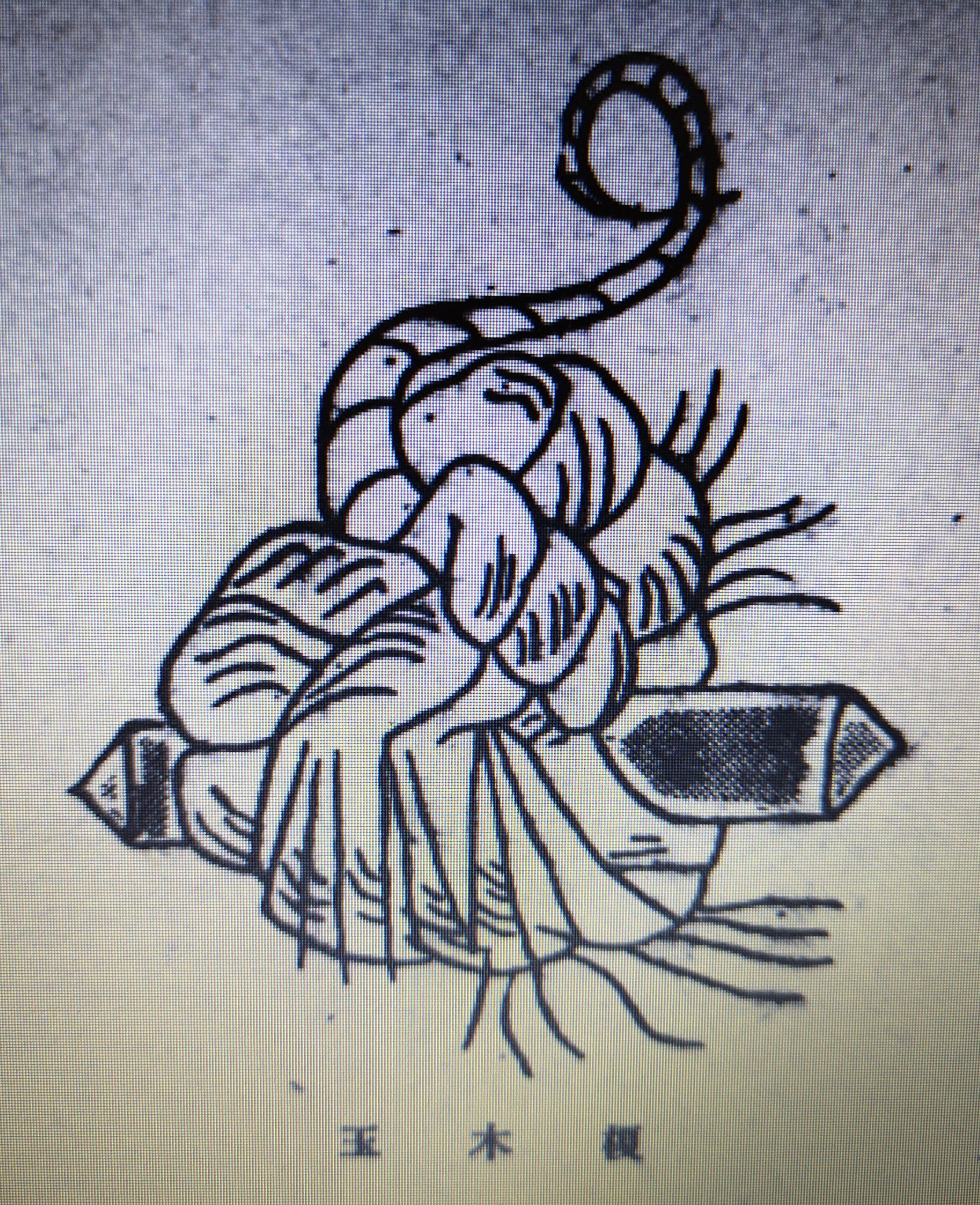 愛知県豊橋市の安久美神戸神明社の例祭で用いられる榎玉